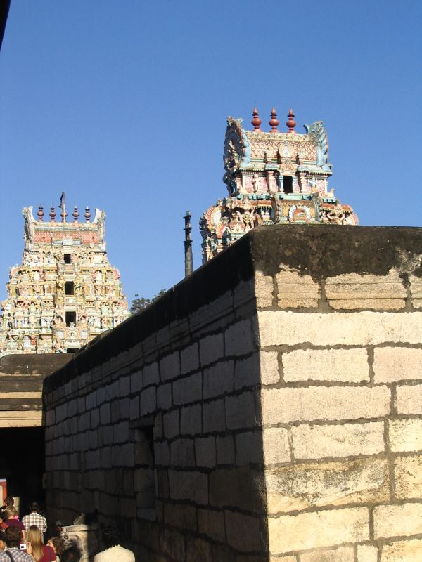 A Hindu temple in Coimbatore, Tamil Nadu